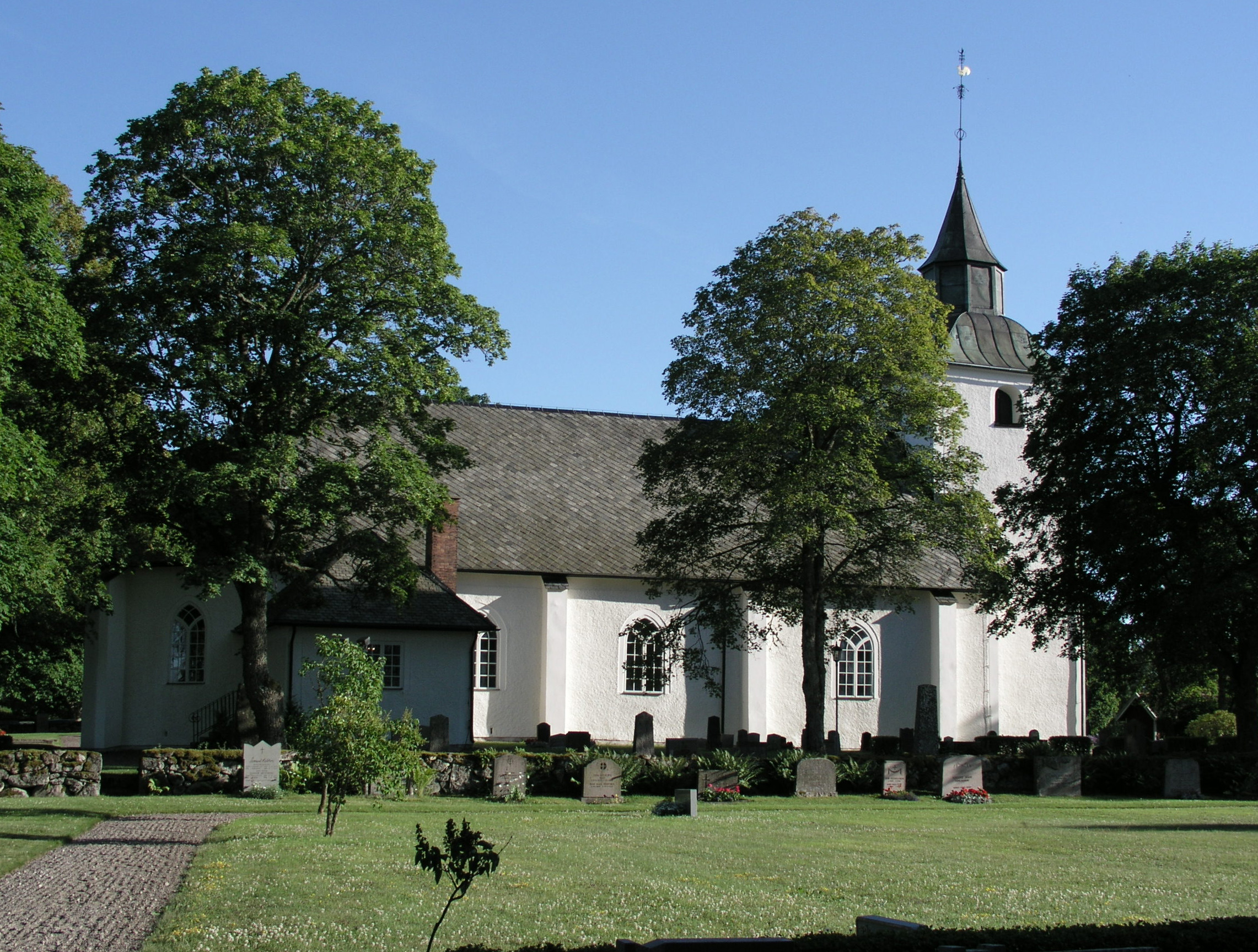 Visnums-Kils kyrka, view